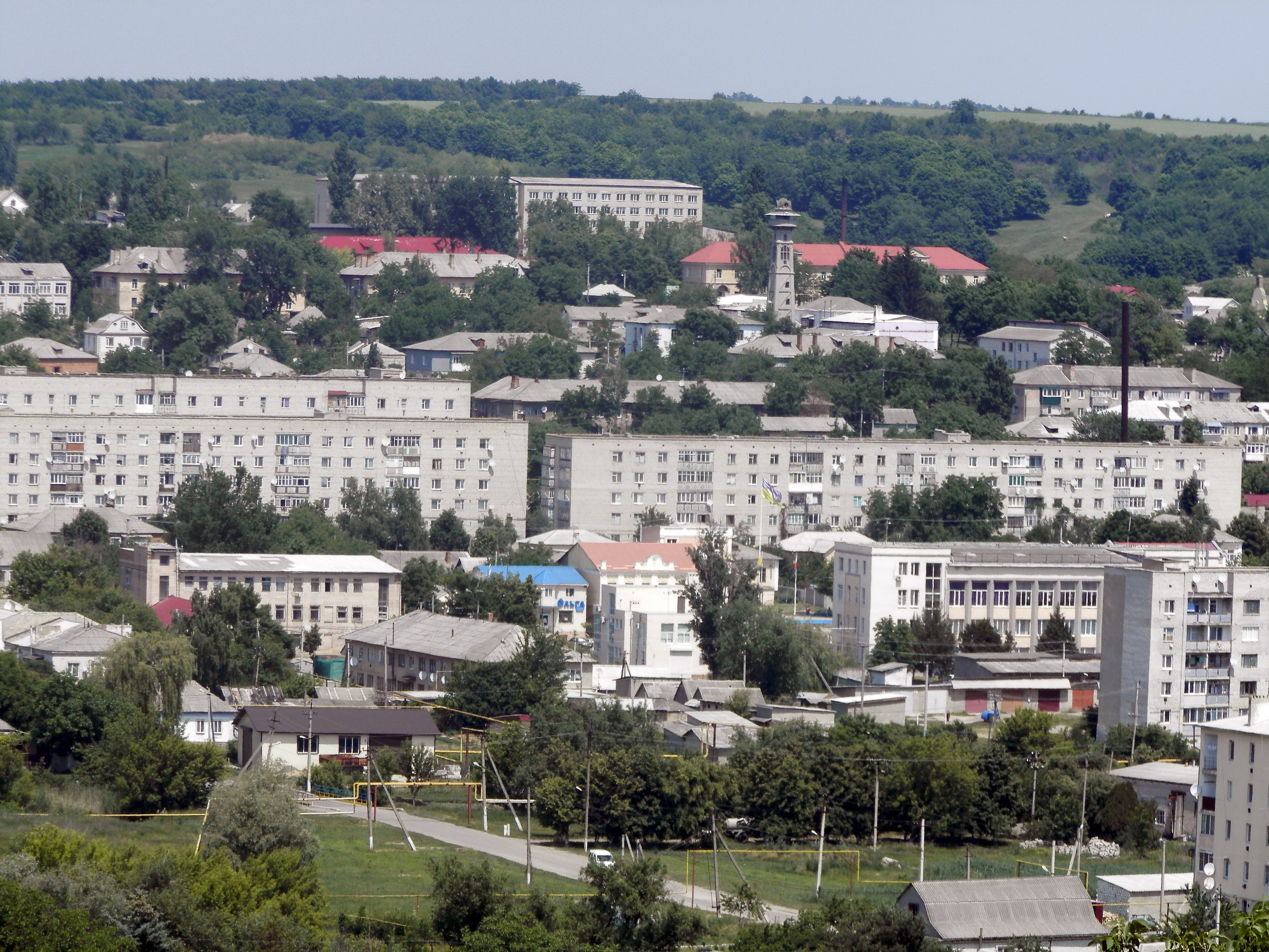 (вид с инвалидского парка)